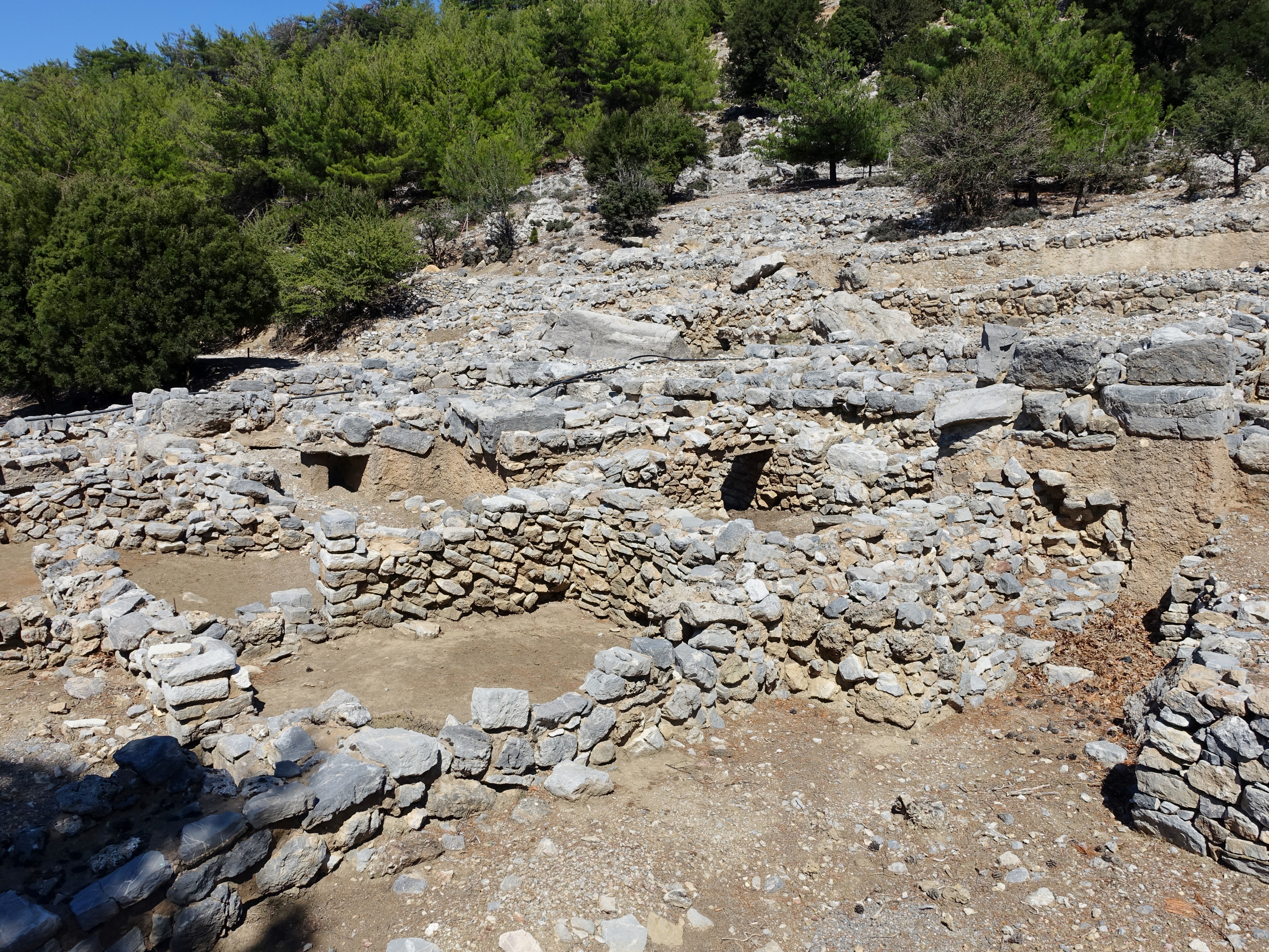 Heiligtum des Hermes und der Aphrodite oberhalb des Ortes Kato Symi (Κάτω Σύμη), Kreta, Griechenland